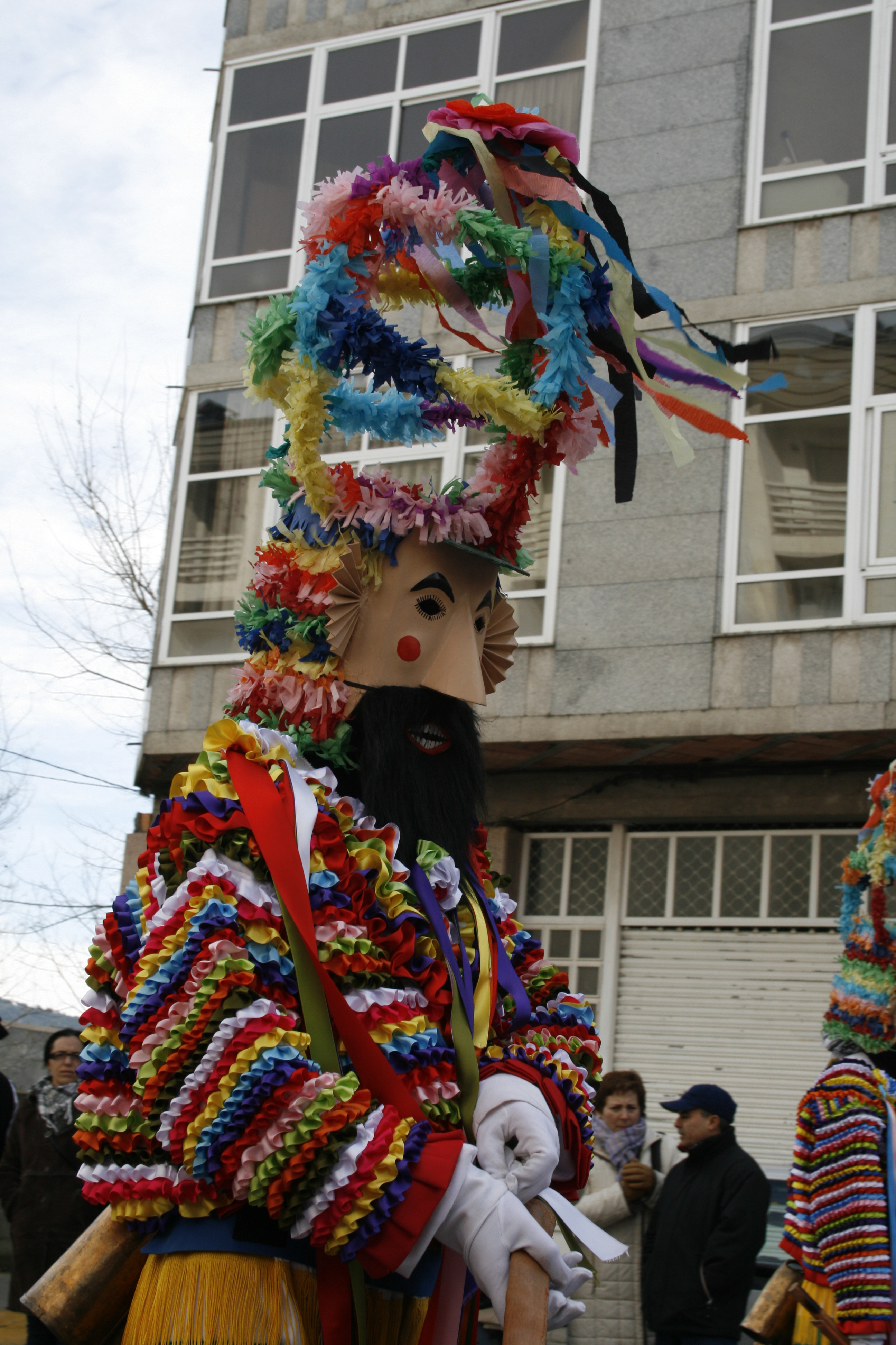 O vellarrón é unha antiga máscara do entroido de Castrelo de Cima no concello de Riós, en proceso de recuperación.